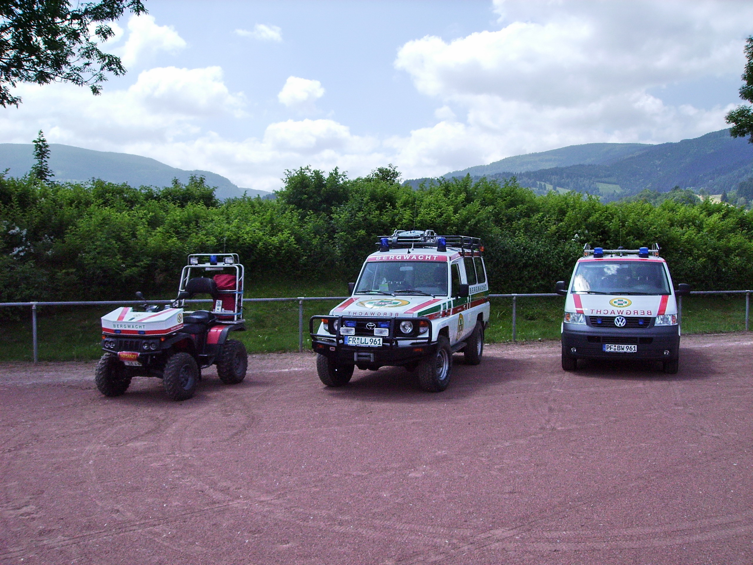 Einsatzfahrzeuge der Bergwacht Schwarzwald e.V. (BWS) - ATV/Quad, Toyota Landcruiser, VW-Bus rescue vehicles of German Black Forest Mountain Rescue (BWS) - All Terrain Vehicle, Toyota Landcruiser, VW-Bus